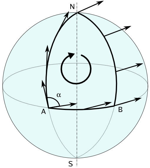 Curvatura intrinseca della sfera: dopo il trasporto parallelo di un vettore lungo il percorso chiuso ANB, il vettore subisce un deviazione proporzionale alla superficie dell'area racchiusa dal percorso e alla curvatura della sfera. Intrinsic curvature of the sphere: if you parallel-transport a vector around the closed loop ANB, the vector is shifted proportionally to the area delimited by the closed loop and to the curvature of the sphere.